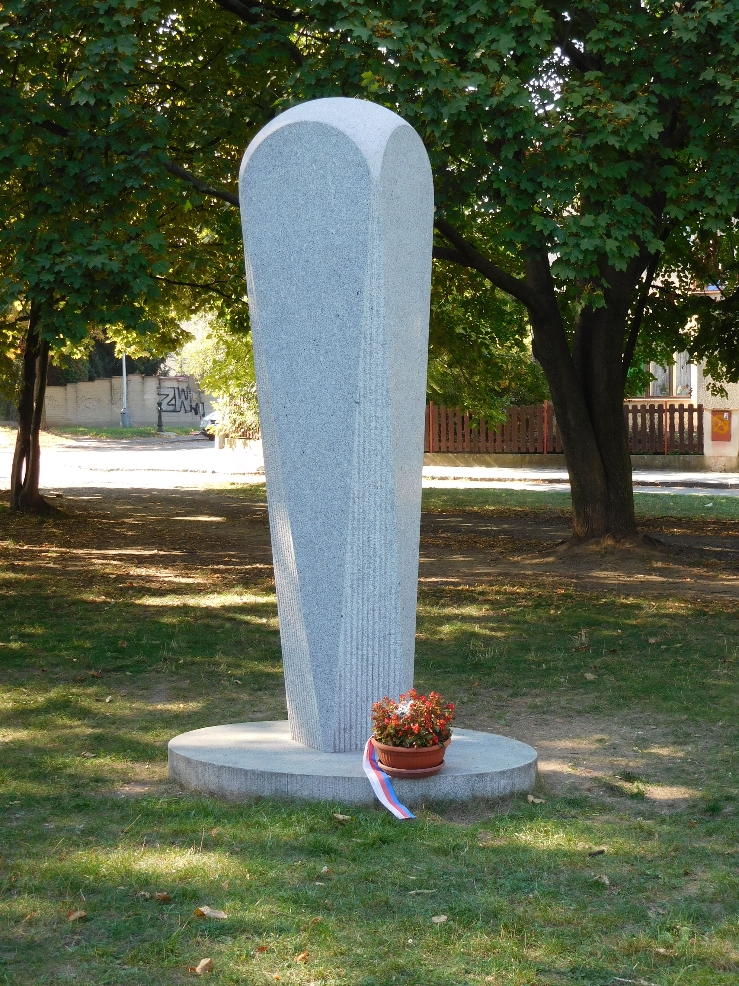 Praha - Suchdol, pomník Rudolfu Pernickému